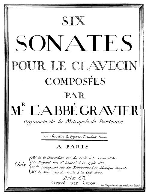 Page de titre de la partition des sonates de l'Abbé Gravier (1759)